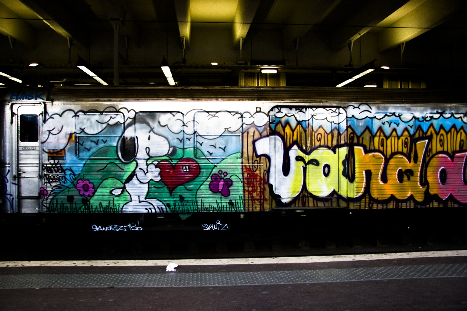 «Saturation Urbaine» à Gare du Nord (Paris, France). Une rame Z 6100 taguée en gare de surface.